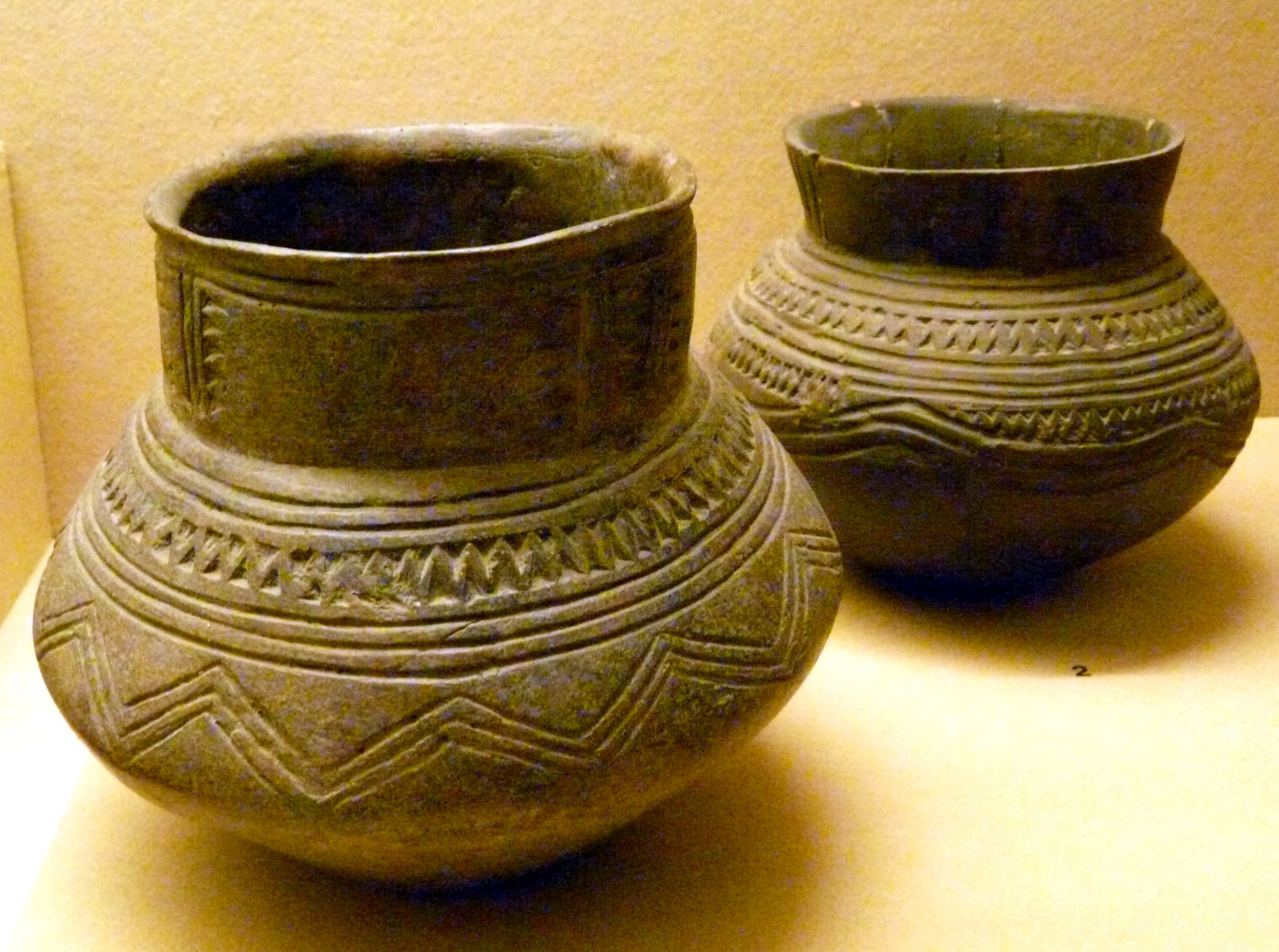 Kerbschnittgefäße der Niederrheinischen Grabhügelkultur (jüngere Bronzezzeit, 1200-800 v.u.Z.), Museum Burg Linn